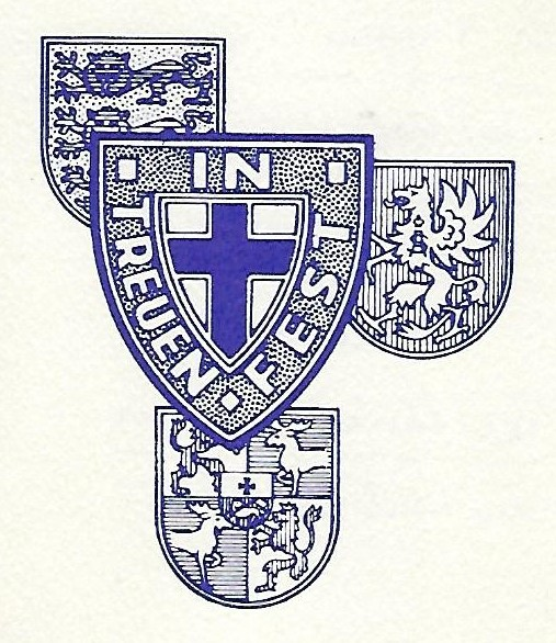 Baltische Wappen: Estland, Livland, Kurland (von oben), im Vordergrund Schild der Deutschbalten.